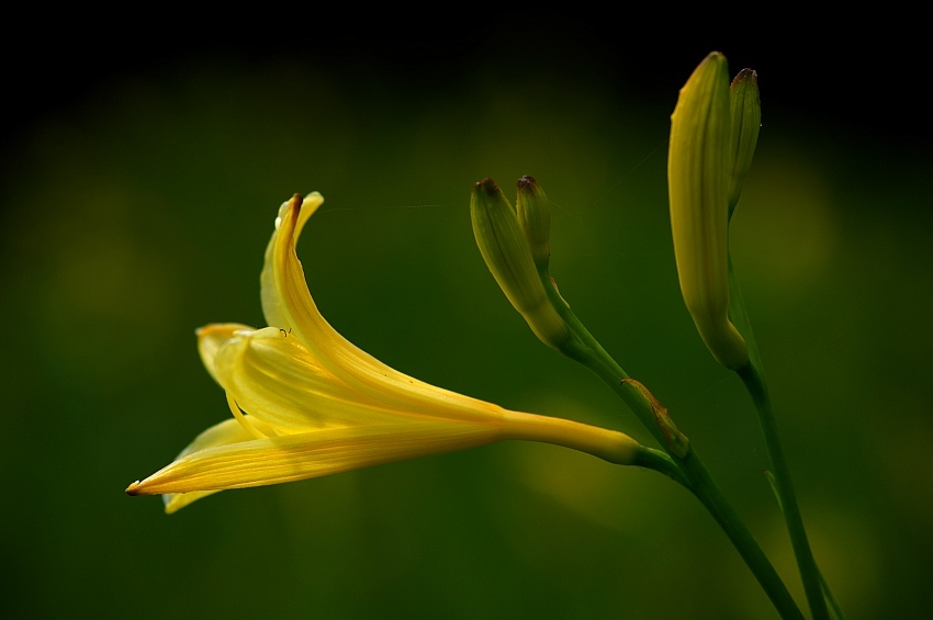 Taglilienblüte (Hemerocallis lilioasphodelus) im Taglilienfeld (Rehling), Landkreis Aichach-Friedberg, Bayern.